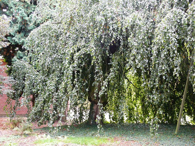 Waarschoot Schoolstraat 5 Treurbeuk bij kasteel De Schepper